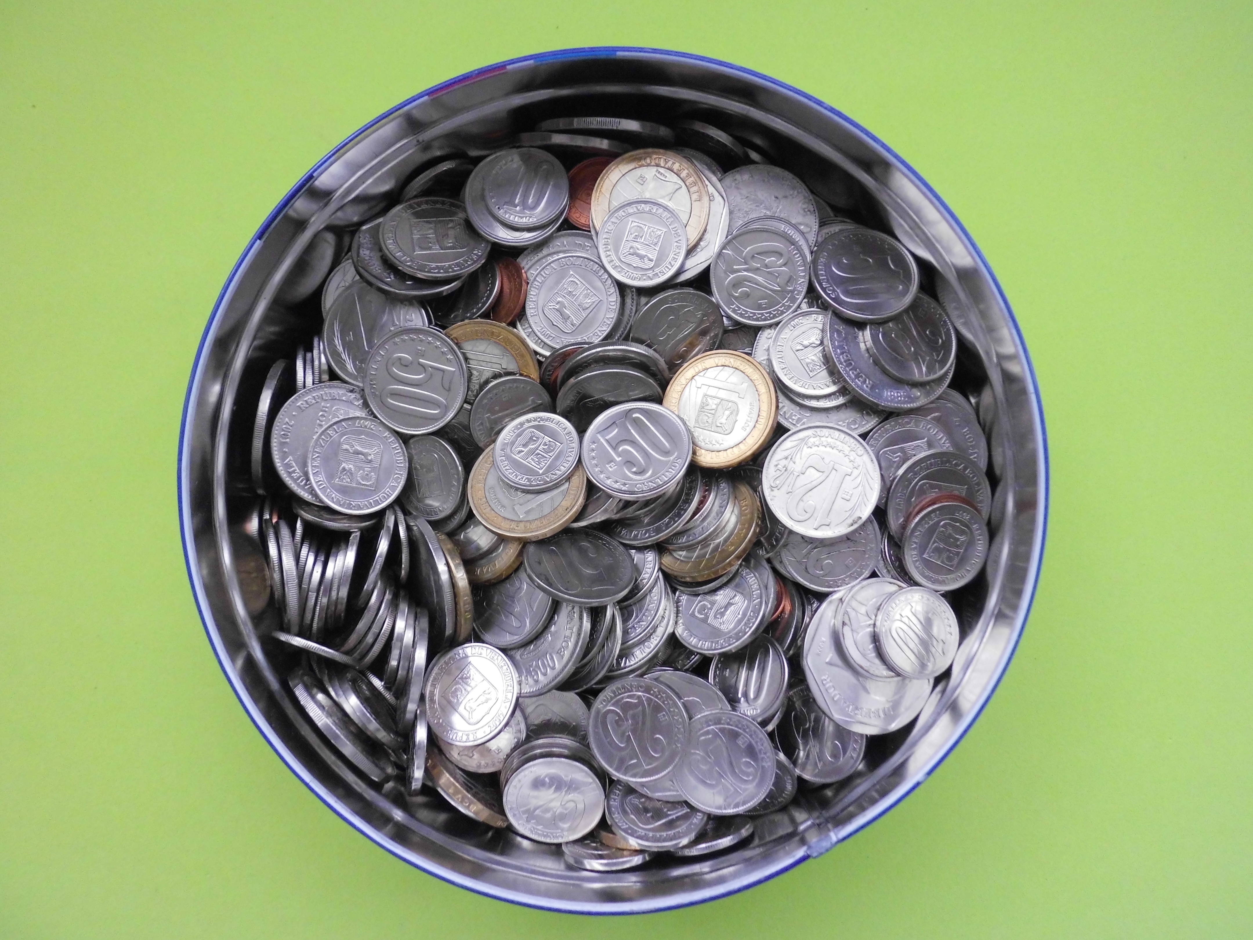 Lata con monedas de Venezuela.